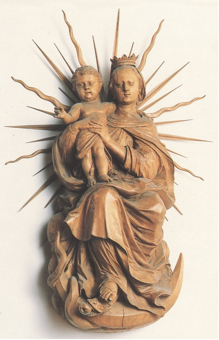 Figur der Mutter Gottes, Church of the Assumption (Haag in Oberbayern)